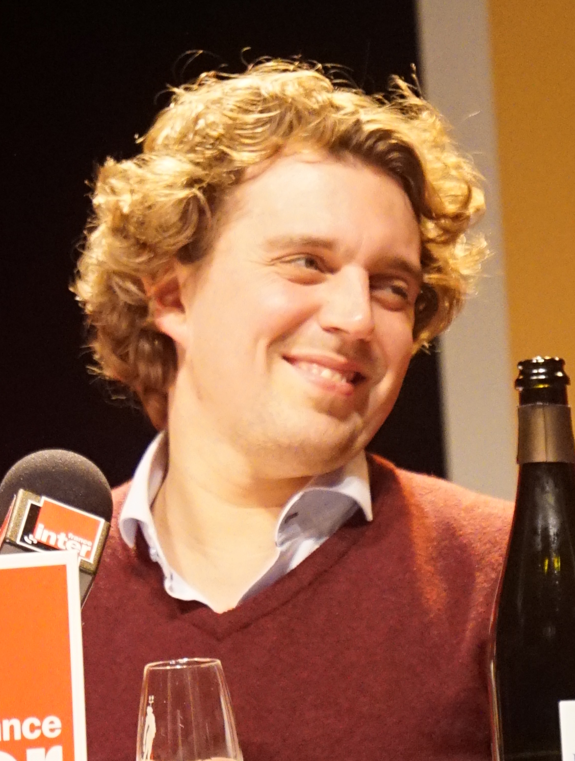 lors des Nuits de Champagne en 2016.